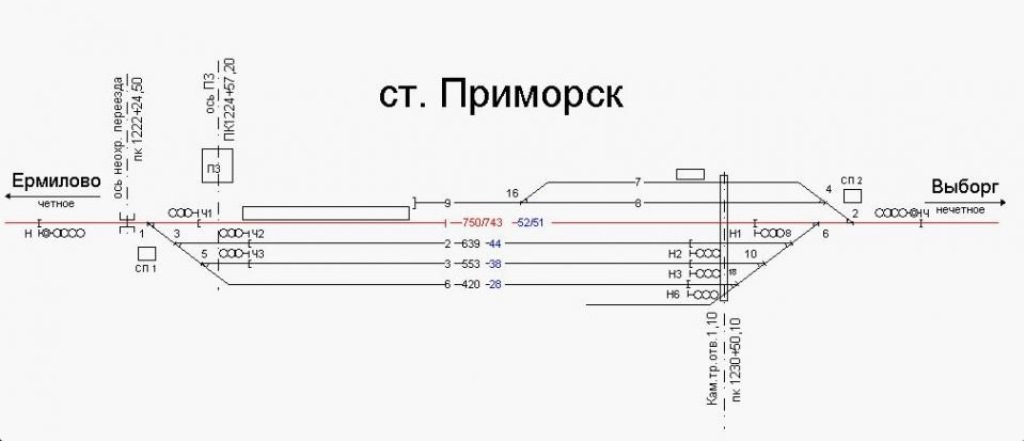 Схема ст. Приморск до реконструкции.